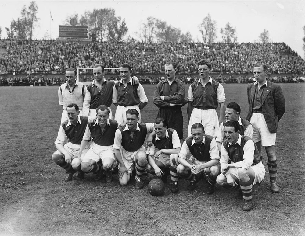 Het elftal van Ajax voor de wedstrijd tegen Feijenoord, 11 mei 1947, met o.a. staand v.l.n.r. ?, Henk van der Linden, Jan Potharst, zittend Joop Stoffelen (geheel links) Rinus Michels zittend derde van links, debuut Cor van der Hart (geheel rechts eerste rij?), De Meer, Amsterdam. Foto Ben van Meerendonk / AHF, collectie IISG, Amsterdam